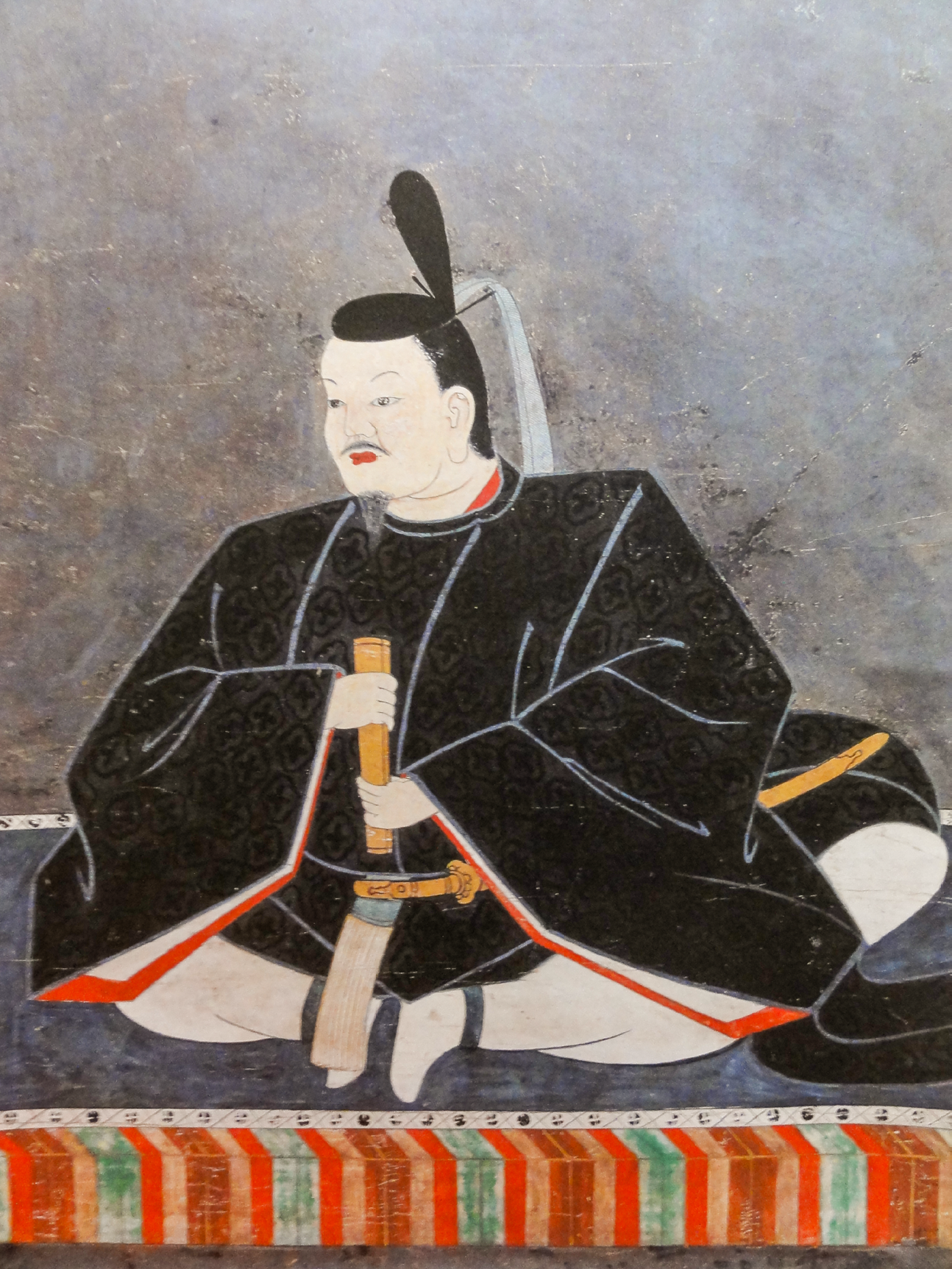 前田利常の肖像。